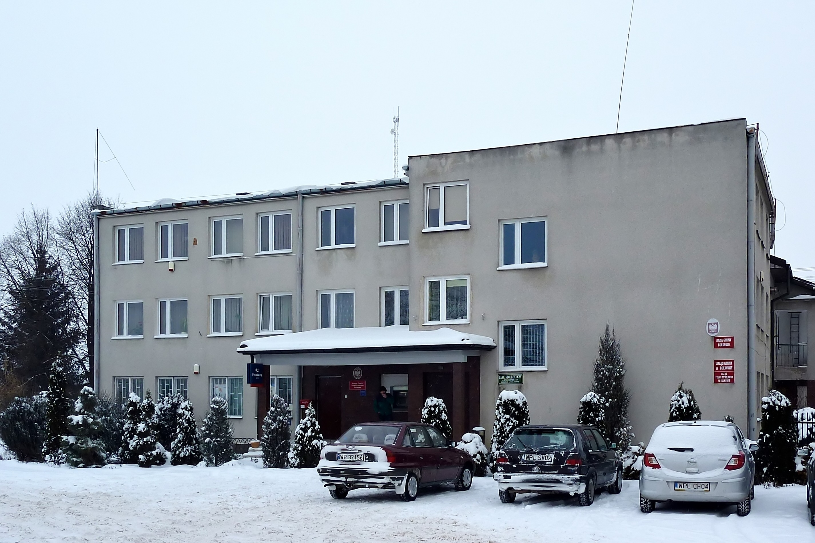 Urząd Gminy Bulkowo w Bulkowie.